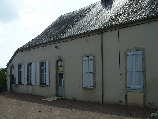 Mairie de la commune de Vauclaix (Nièvre)